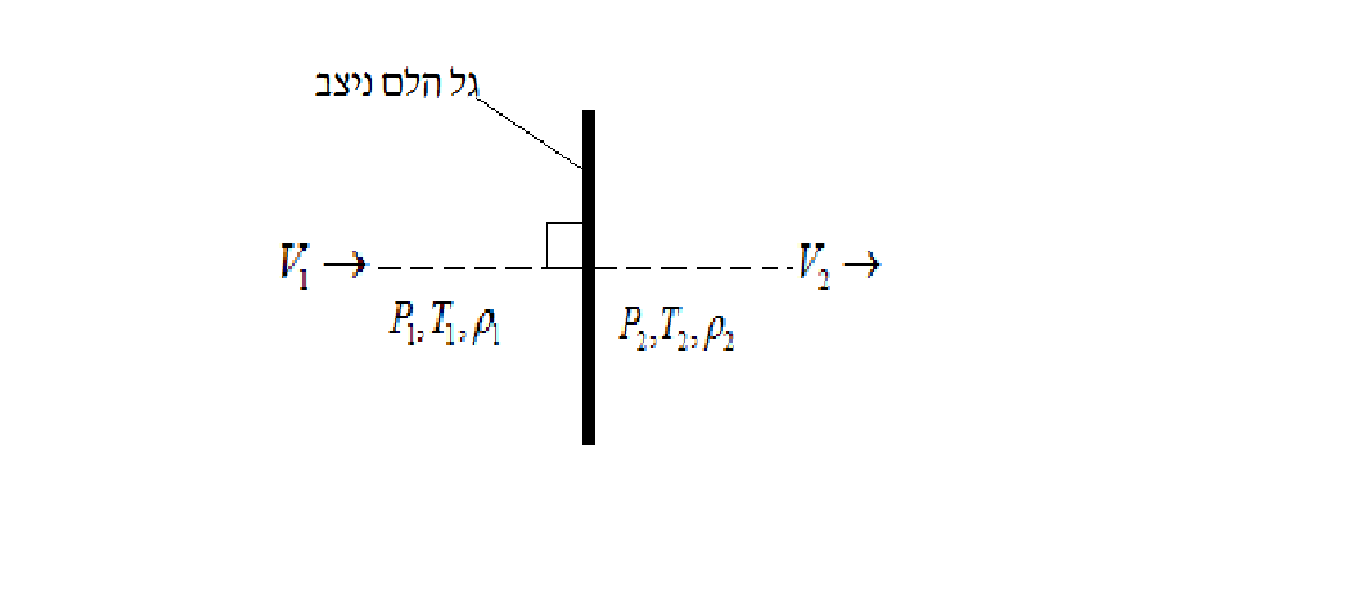 גל הלם ניצב